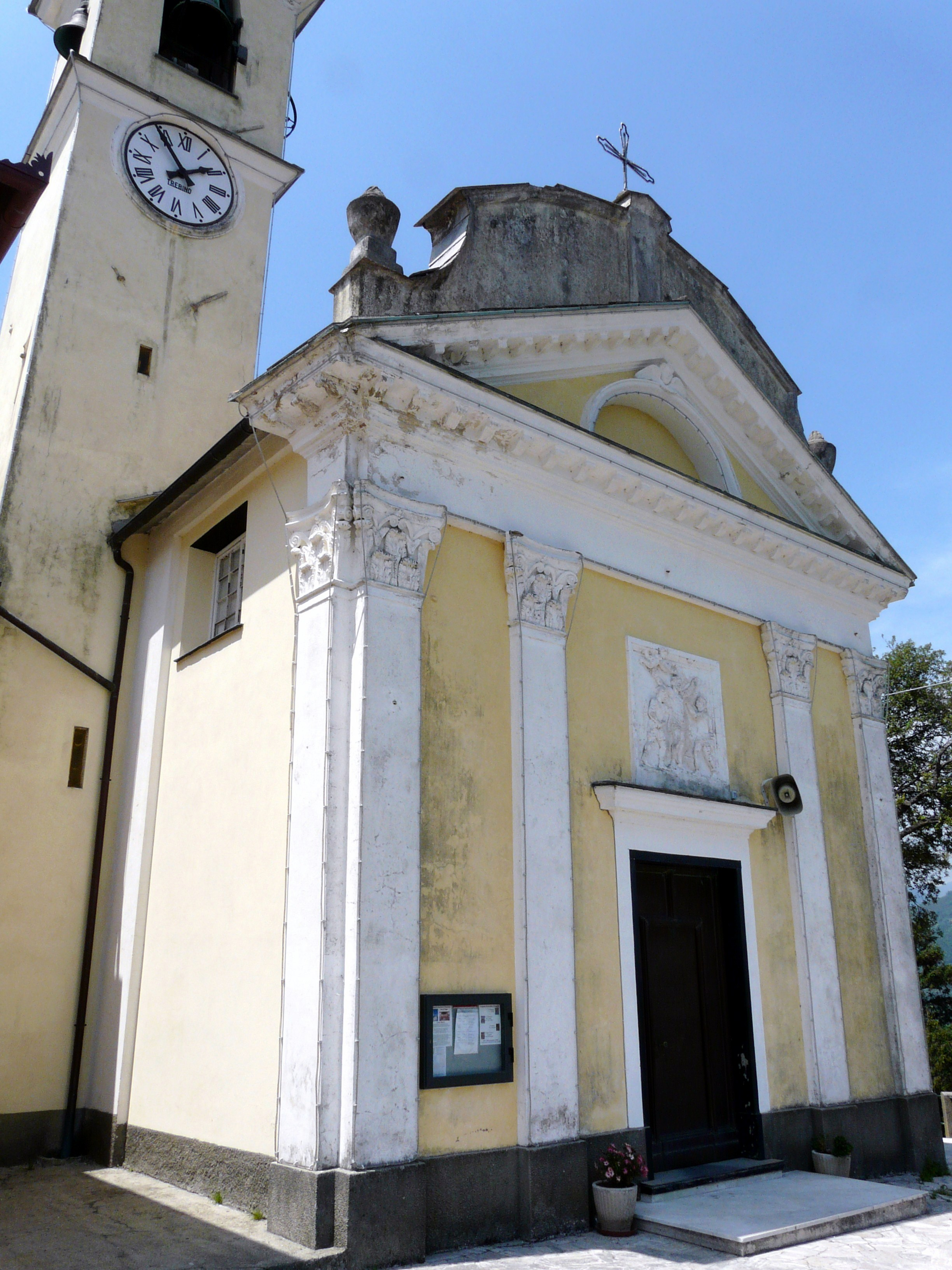 La chiesa di San Bartolomeo di Serra, Cicagna, Liguria, Italia